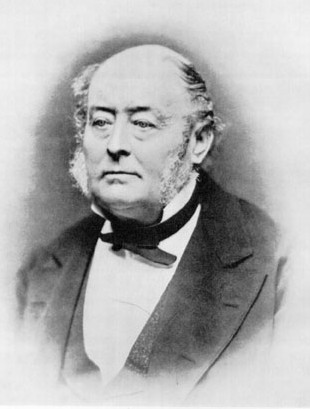 Johann Jacob Bachofen